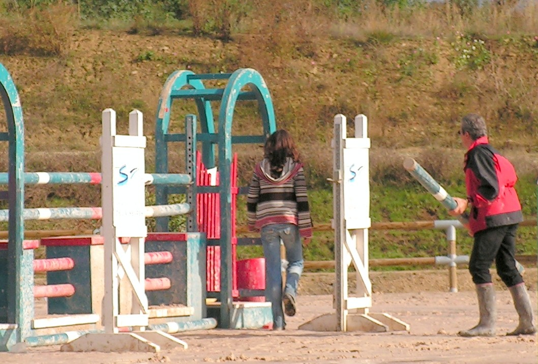 "Hommes de piste" au travail Date et lieu : Septembre 2006 à Niort (France) Auteur : Karlyne